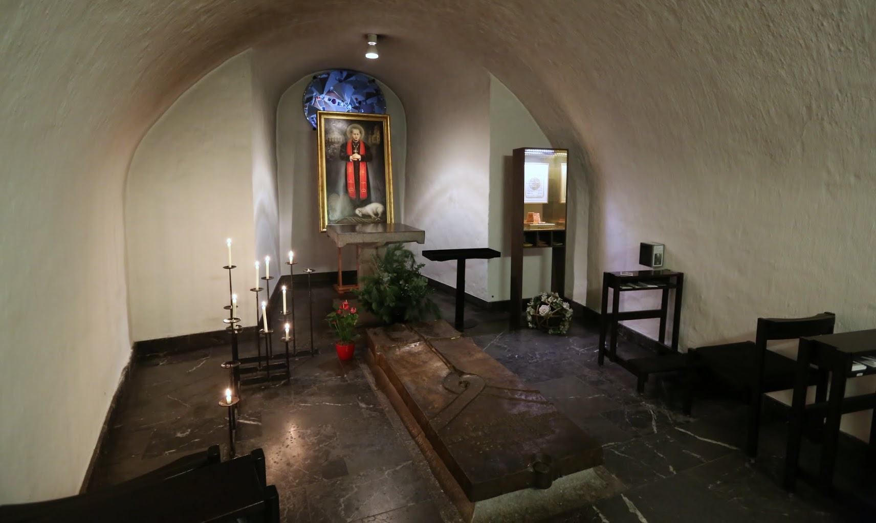 Szent Hedvig-katedrális, az altemplomban Bernhard Lichtenberg sírja